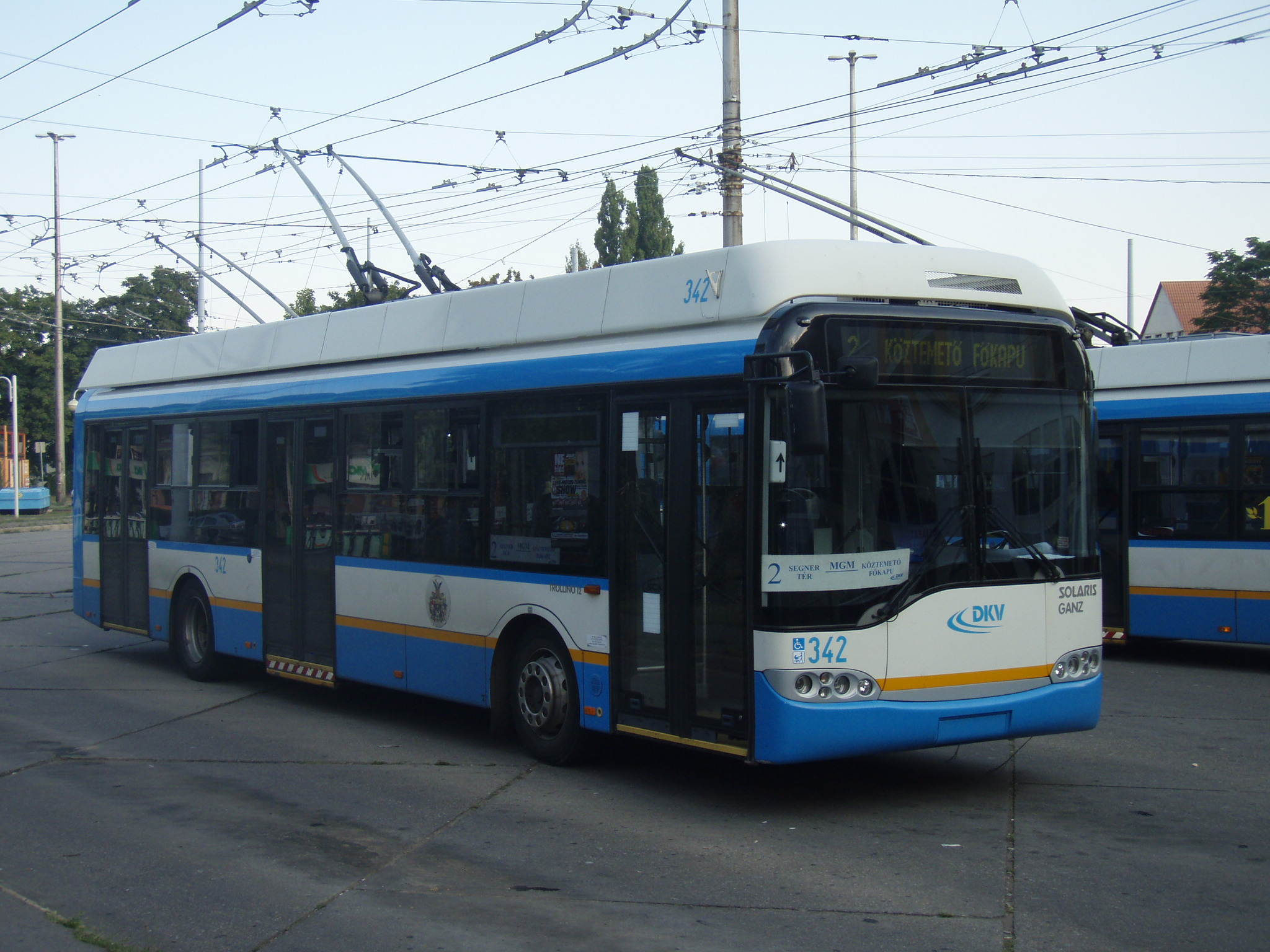 2-es trolibusz a Segner téren (Debrecen)